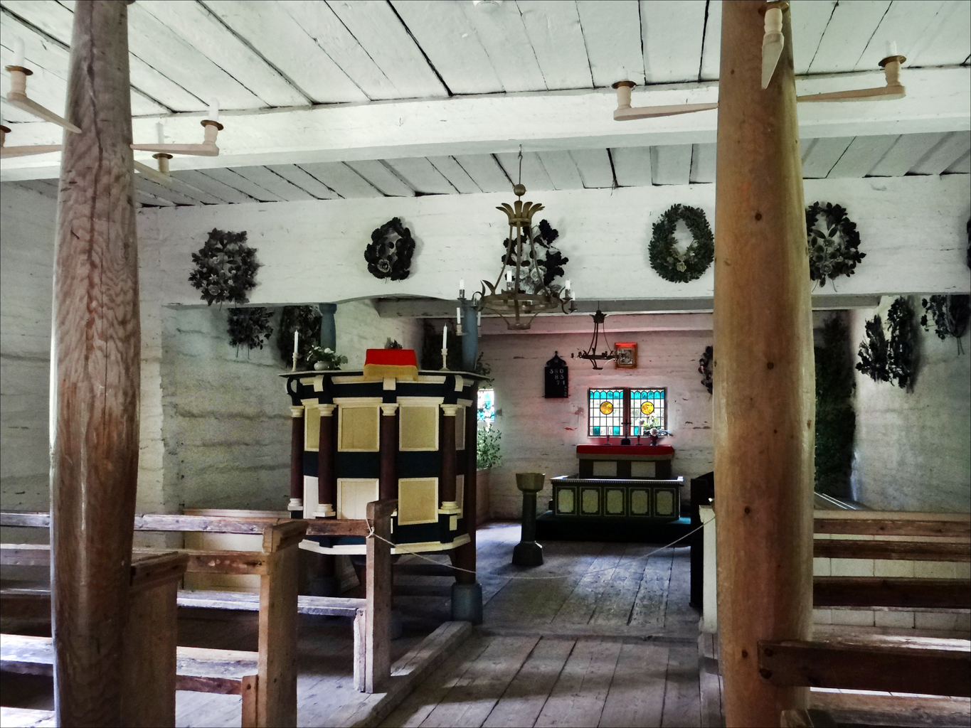 Intérieur de la chapelle de Sutlepa datant de 1699 Cette chapelle traditionnelle en bois a été construite dans le village de Sutpela, Laanemaa. Elle sert encore aux offices. Des chandelles servent à l'éclairer. Site du musée ethnographique de plein air